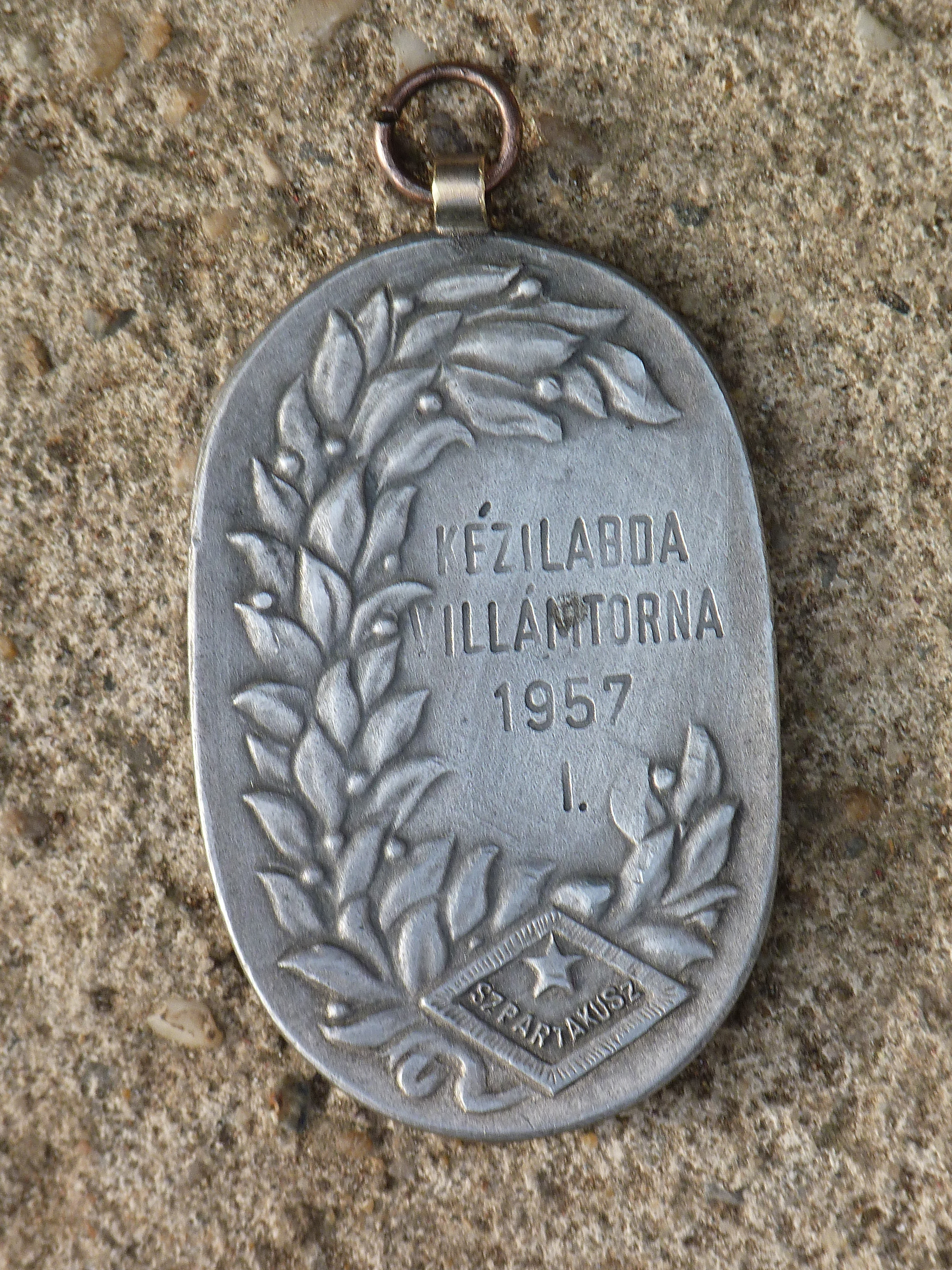 A felvétel 2012. november 11 -én készült. Fém emlékérem,4,8 cm x 3,1 cm. Spartakusz kézilabda emléktorna 1957 I. ©© Megjelent Creative Commons alatt a Metapolisz sorozatban. A Metapolisz sorozat valamennyi képe és filmje Creative Commons alatti valamint kereskedelmi - for profit - célra is felhasználható. Ajánlott hivatkozás: Derzsi Elekes Andor: Metapolisz DVD line ©© Published under Creative Commons in the Metapolisz DVD line. All of the photos and vids in the Metapolisz DVD line are under Creative Commons and can be used even for commercial – for profit – purposes. Recommended Citation Derzsi Elekes Andor: Metapolisz DVD line